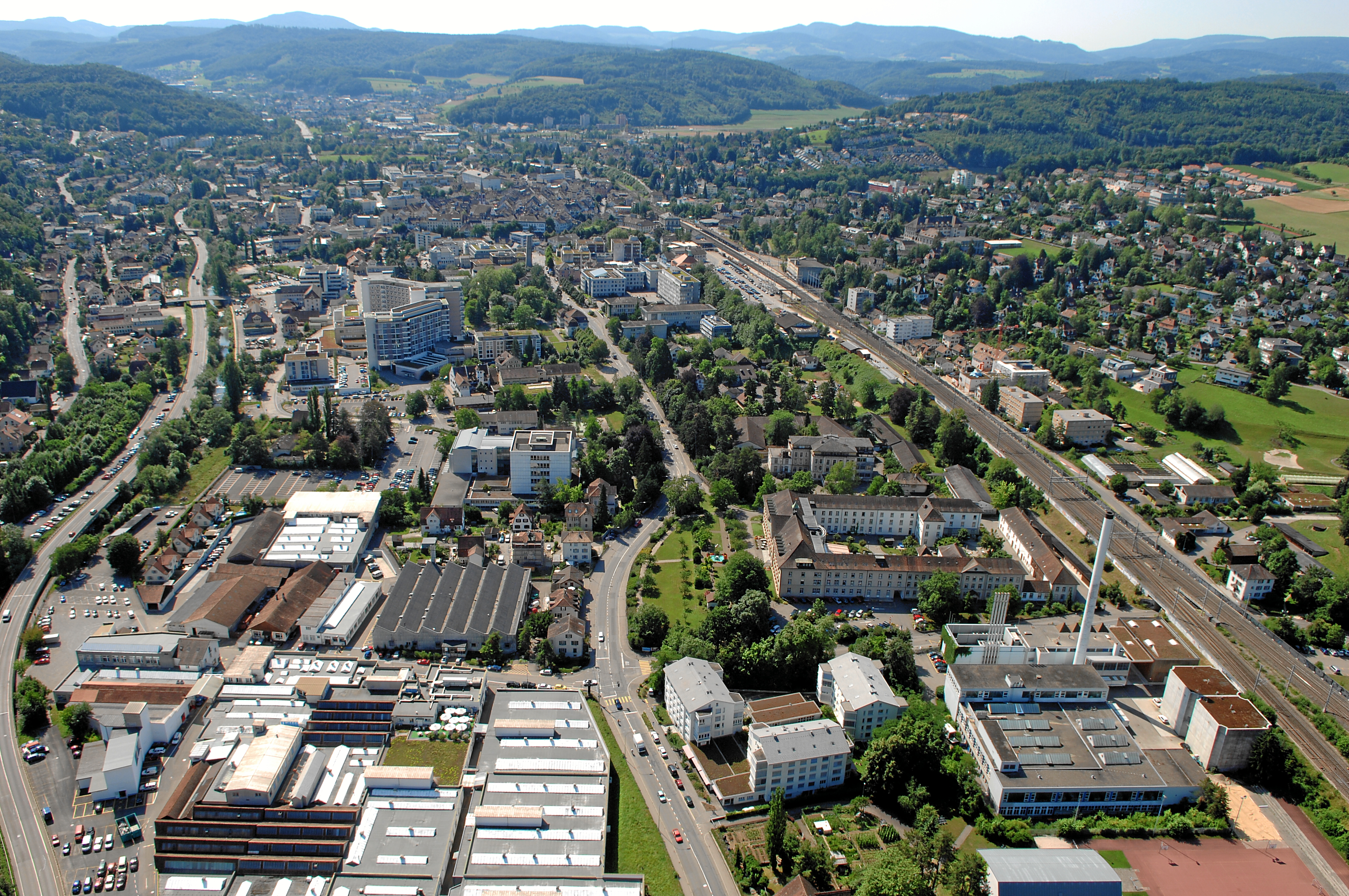 Luftaufnahme Liestal Quelle: Informationsdienst Stadt Liestal